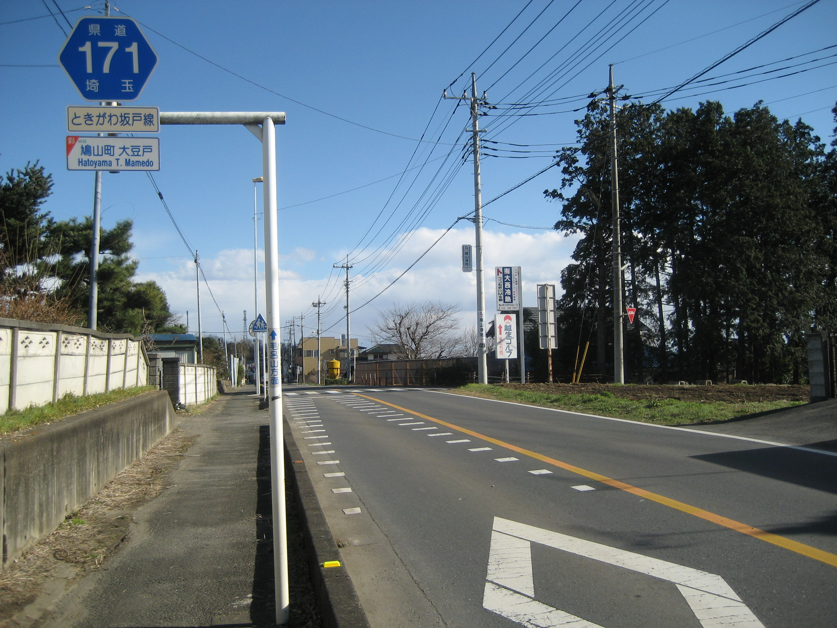 埼玉県道１７１号線鳩山町内